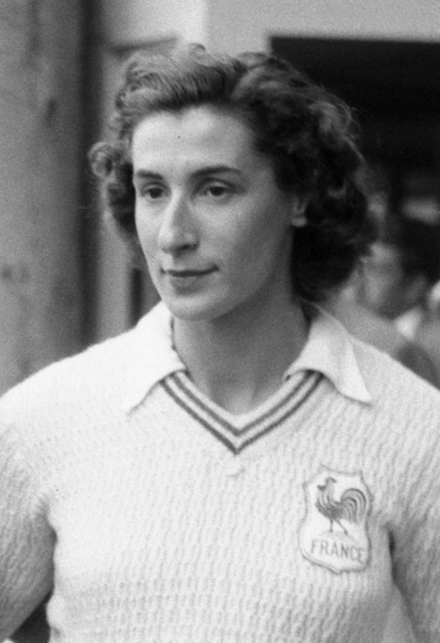 Europese atletiekkampioenschappen te Brussel; Fanny Blankers-Koen (midden), Gardner en Ostermeyer